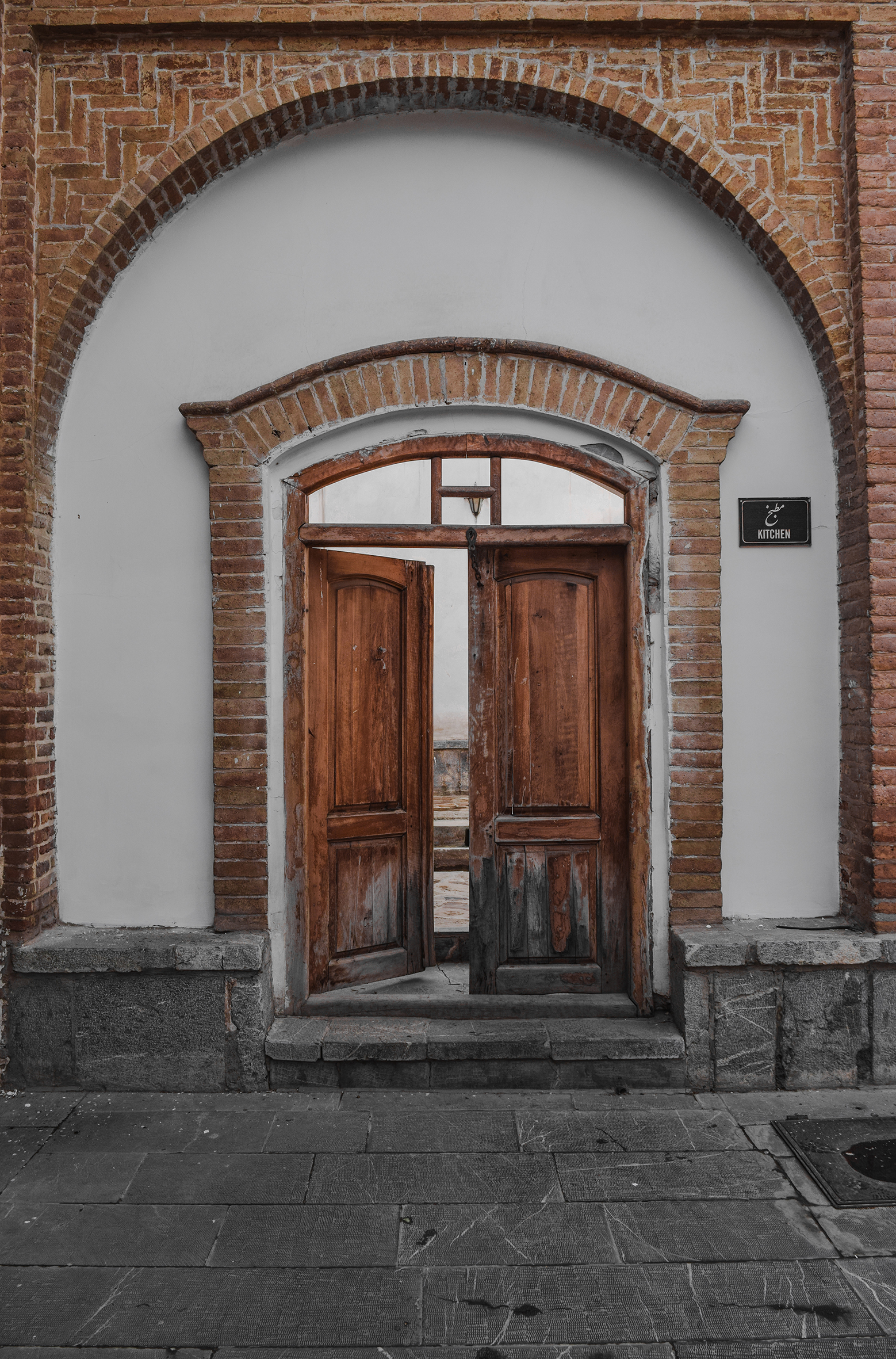 خانه آصف وزیری